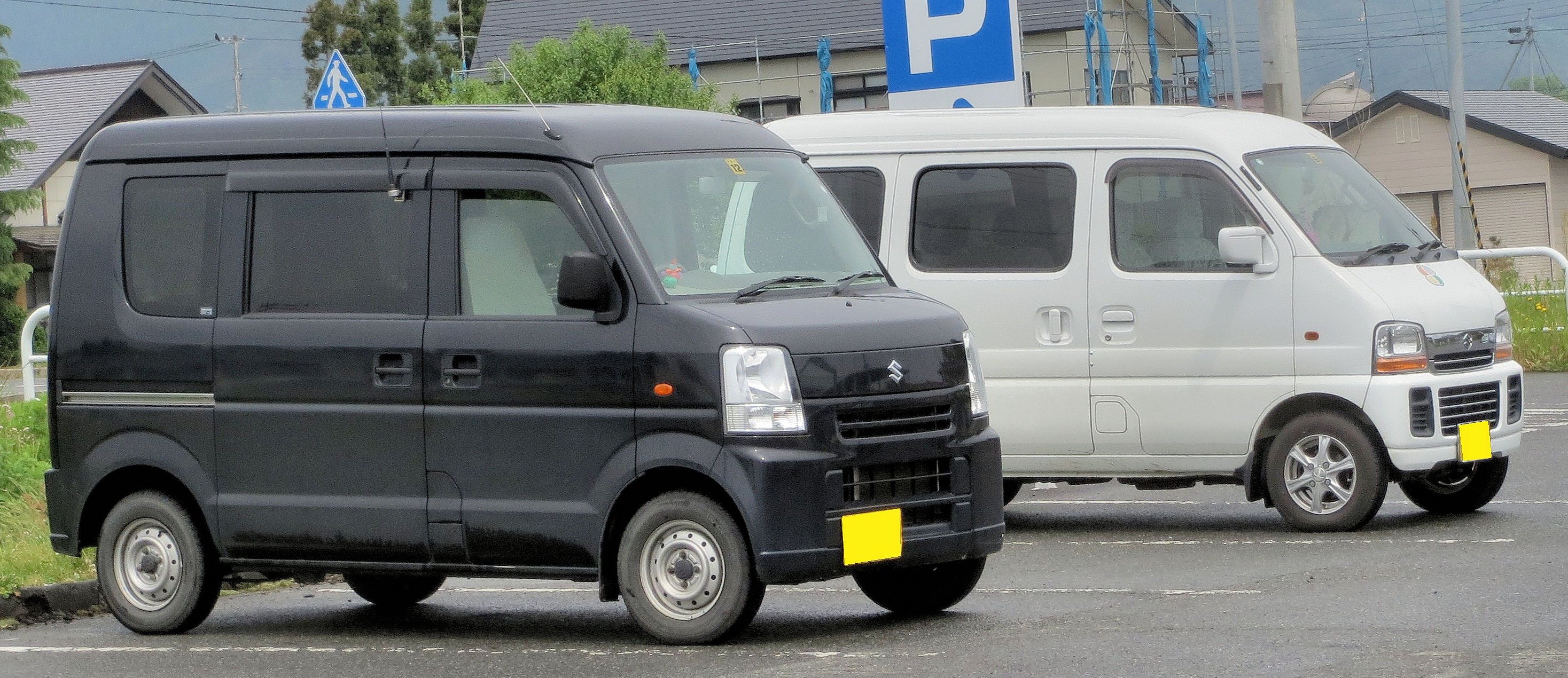 5代目エブリイ（手前）と4代目エブリイ（奥）